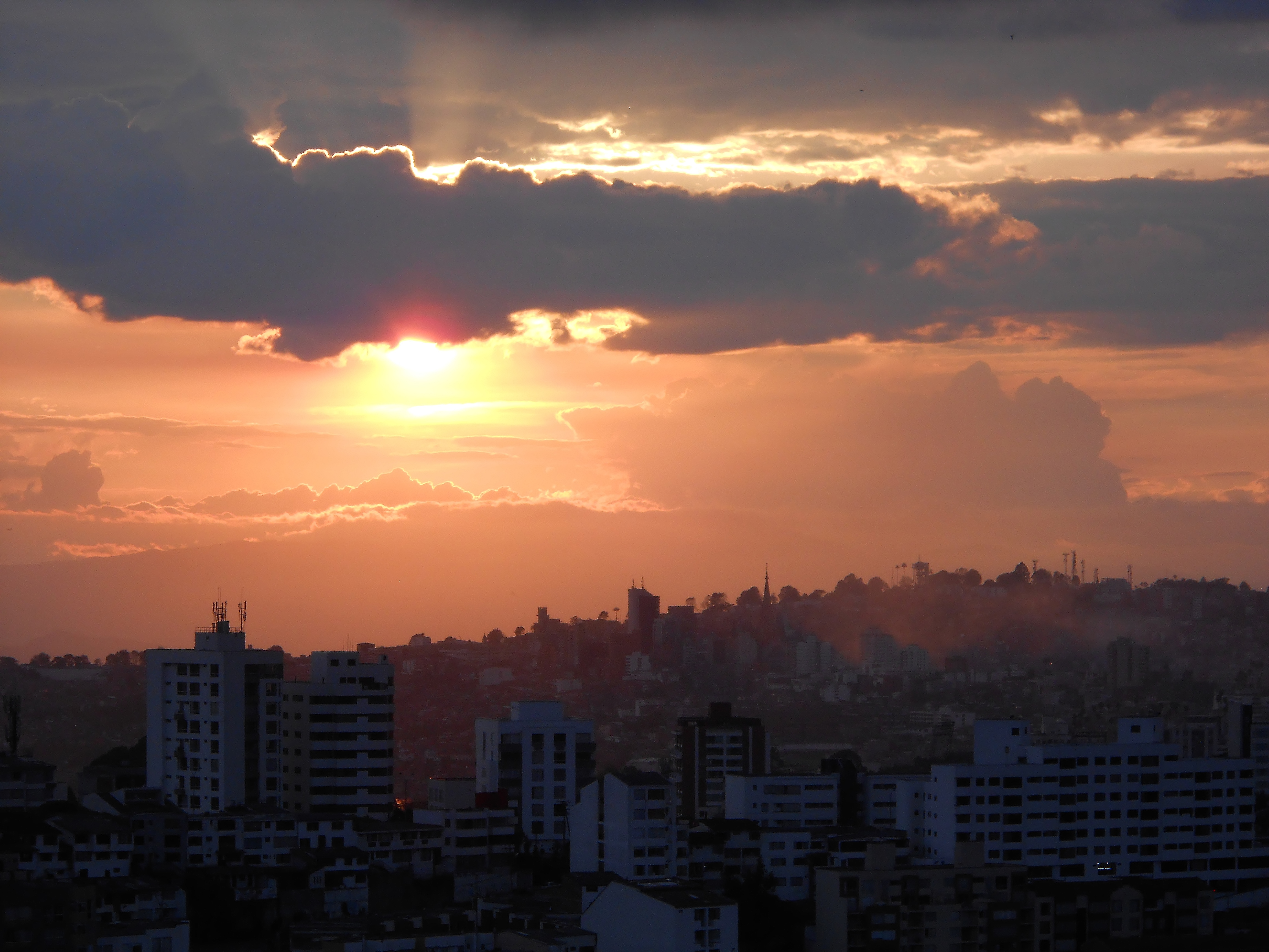 Oriente de la ciudad, fotografia tomada desde el sector de Milan.